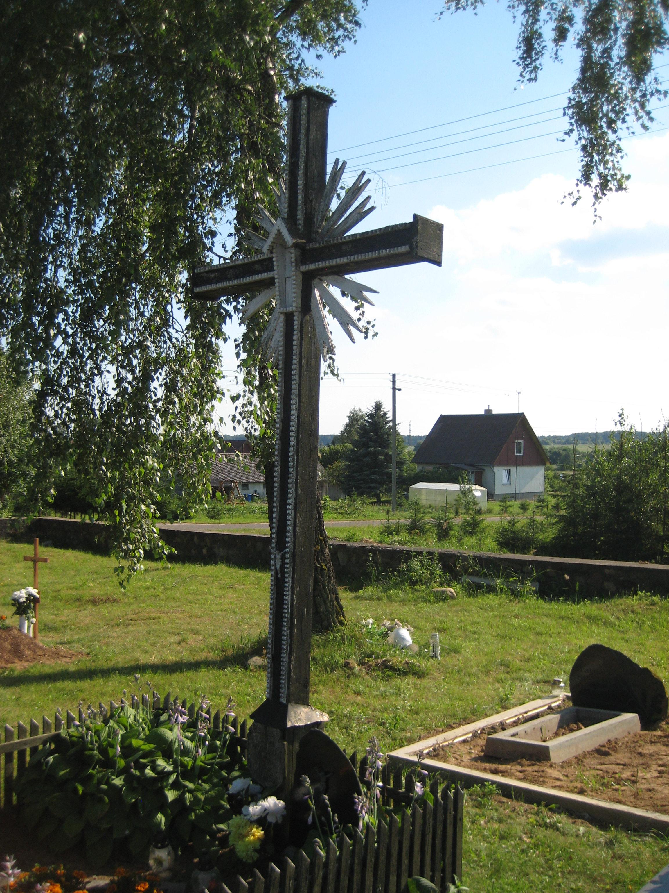 Panočiai, Lithuania